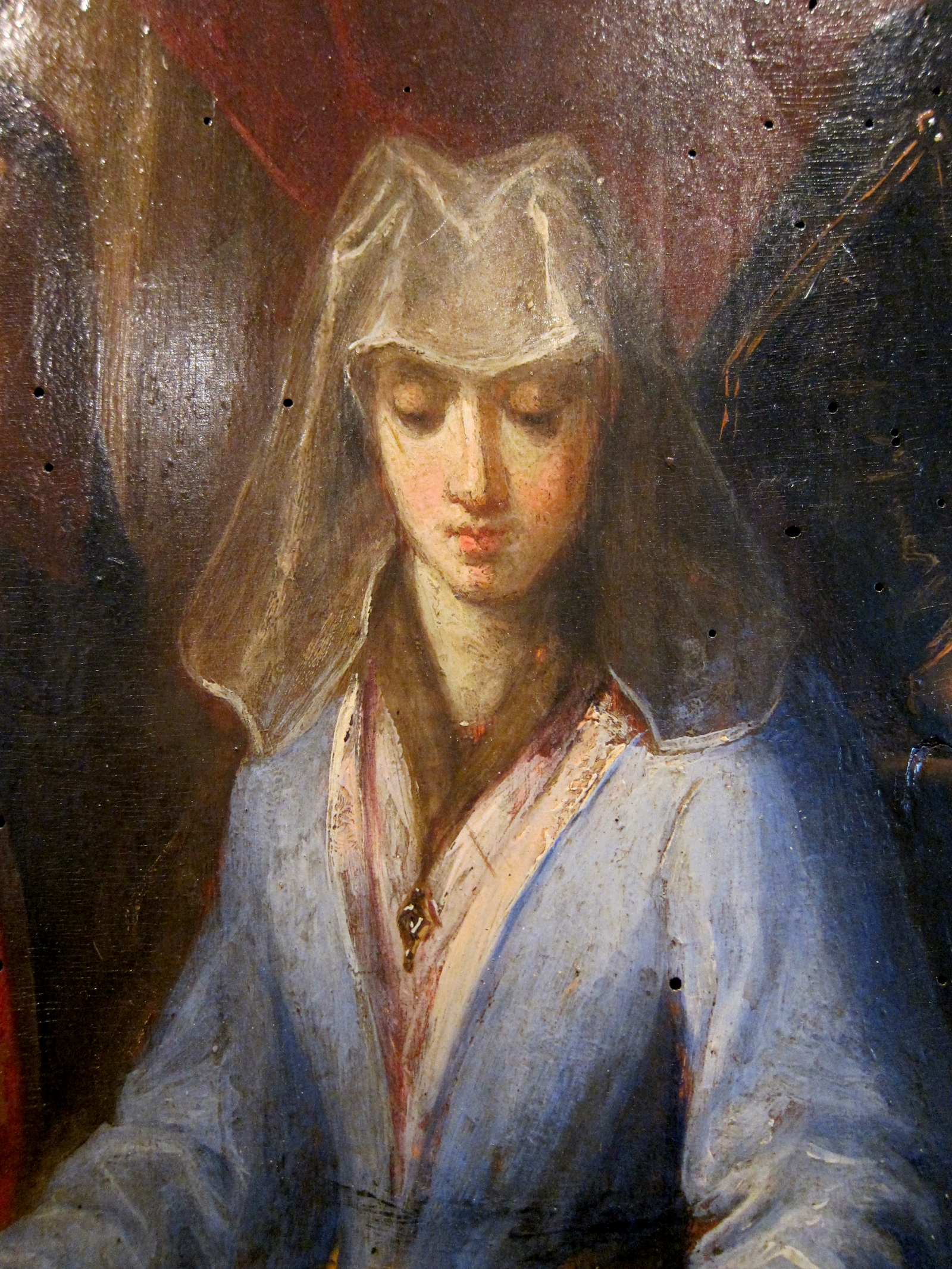 Portrait de Jeanne de Constantinople par Arnould de Vuez (détail) au musée de l'Hospice Comtesse de Lille.